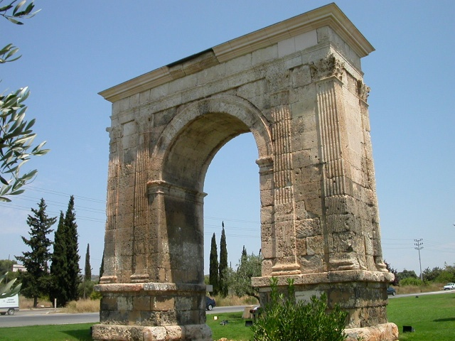 Arco del triunfo